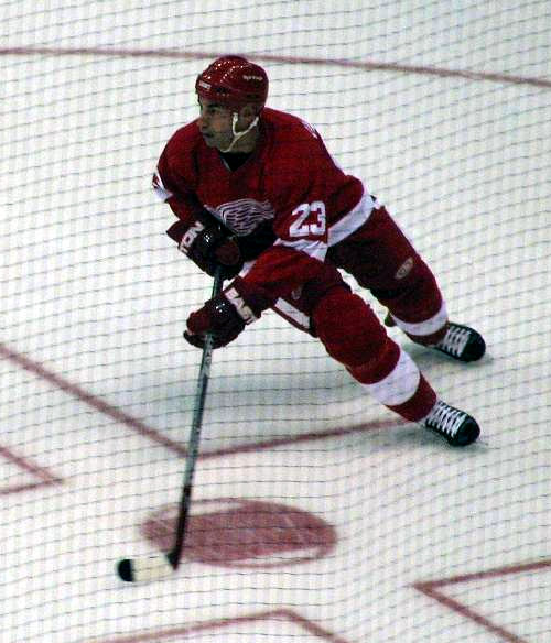 Schneider during a game against Vancouver – October 6, 2006